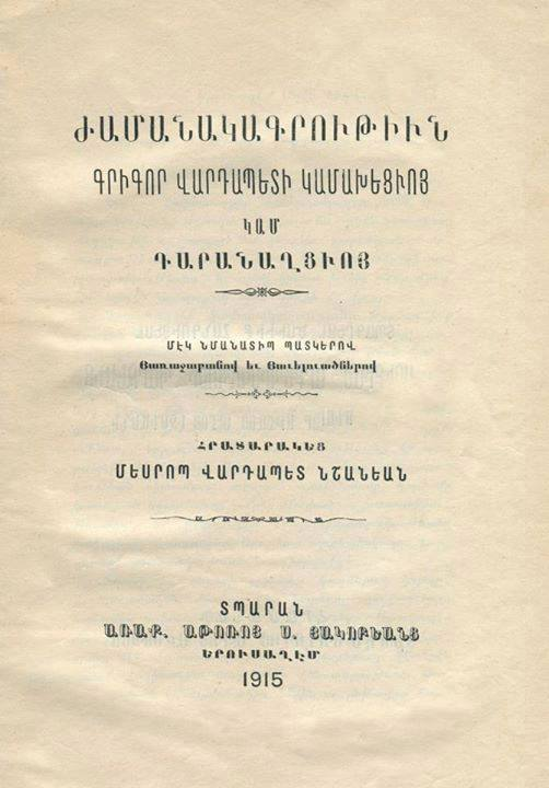 Обложка издания "Хронографии" армянского историка XVII века Григора Даранагеци